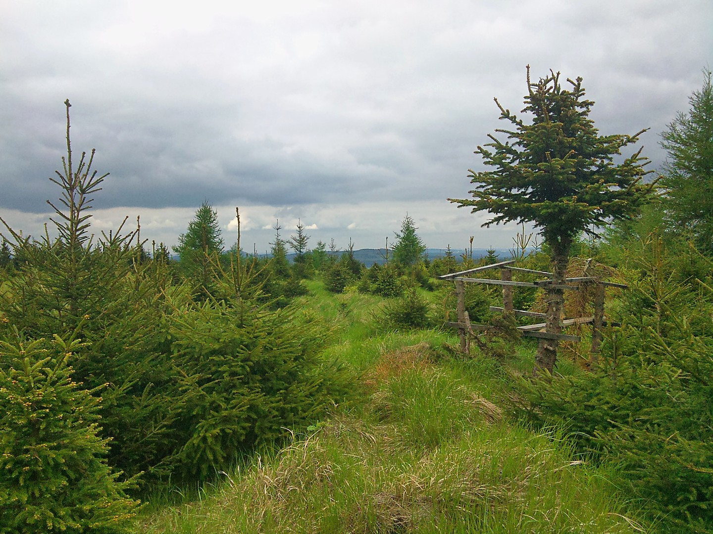 Severní vrchol Loučné v Krušných horách (1019 m)